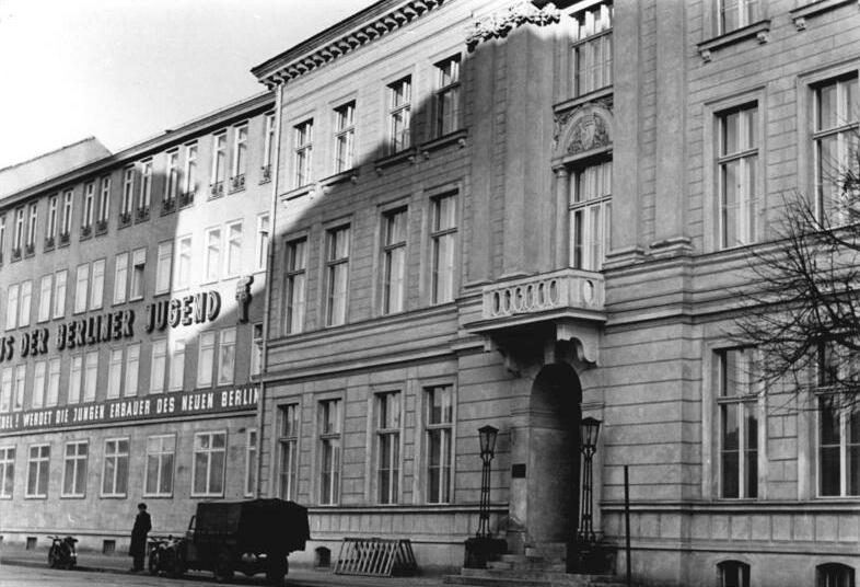 Zentralbild-Gielow- 18.1.1952 Alte Berliner Häuser. UBz: Haus der Berliner Jugend, Parochialstrasse. Information added by Wikimedia users.Korrektur: Das Foto zeigt die in der Klosterstraße 68-70 gelegene Hauptfront des Palais Podewils (heute zumeist nur: Podewil). Nur die Seitenfront liegt in der Parochialstraße. Die offizielle Bezeichnung des Gebäudes in der DDR lautete ab 1954 "Haus der jungen Talente".